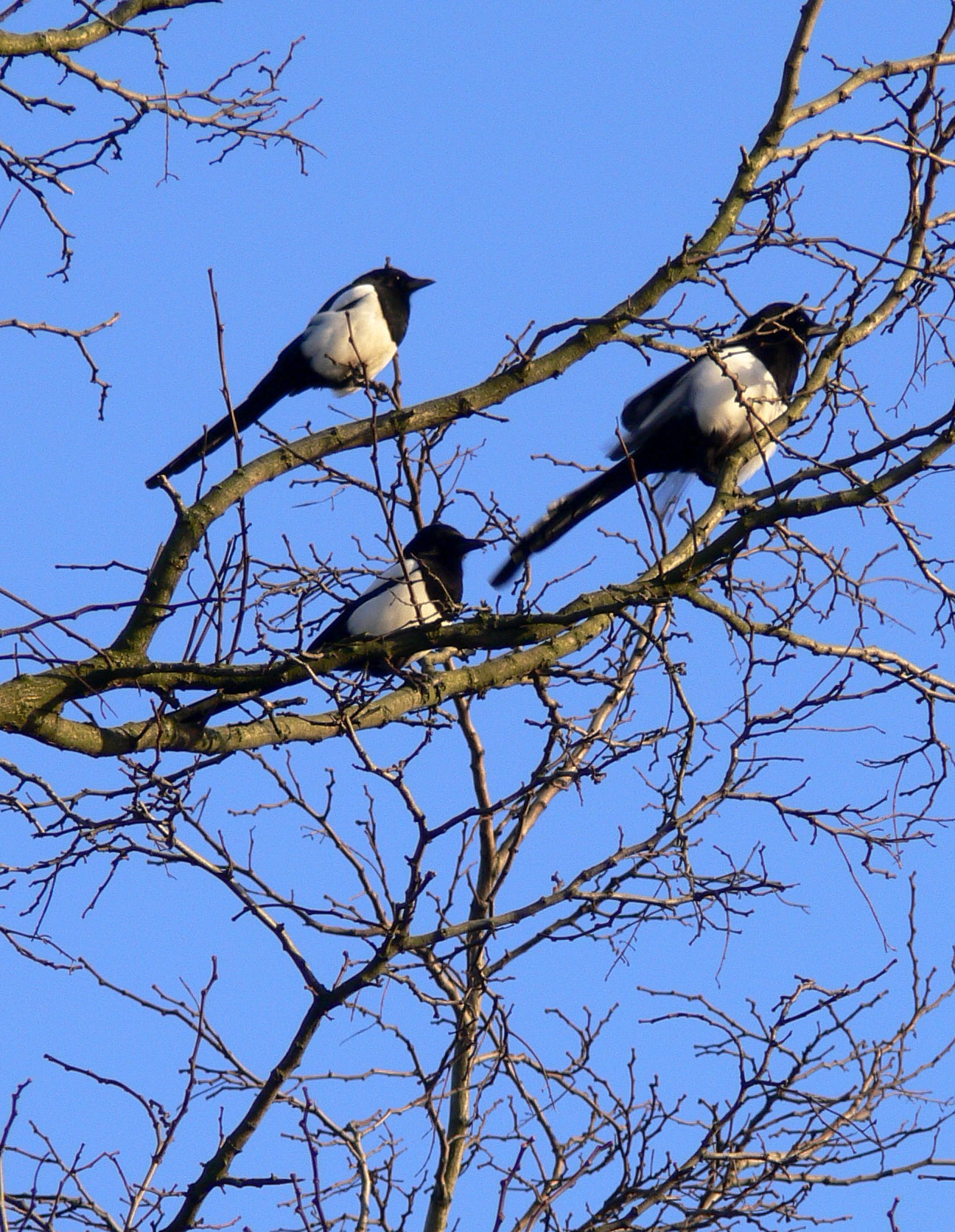 Pies (Pica pica), Lille Nord de la France).